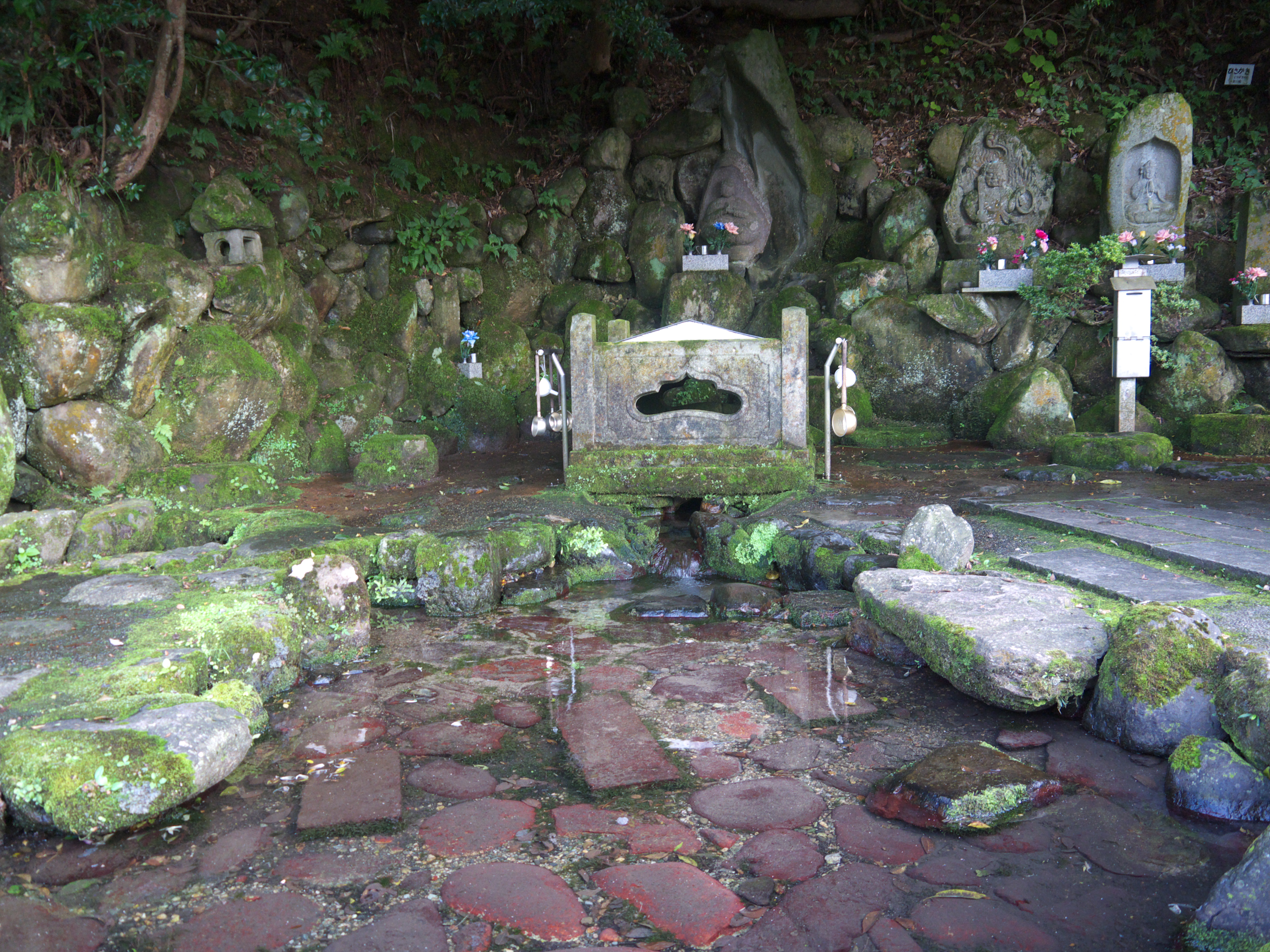 名水百選富山県砺波瓜割の清水